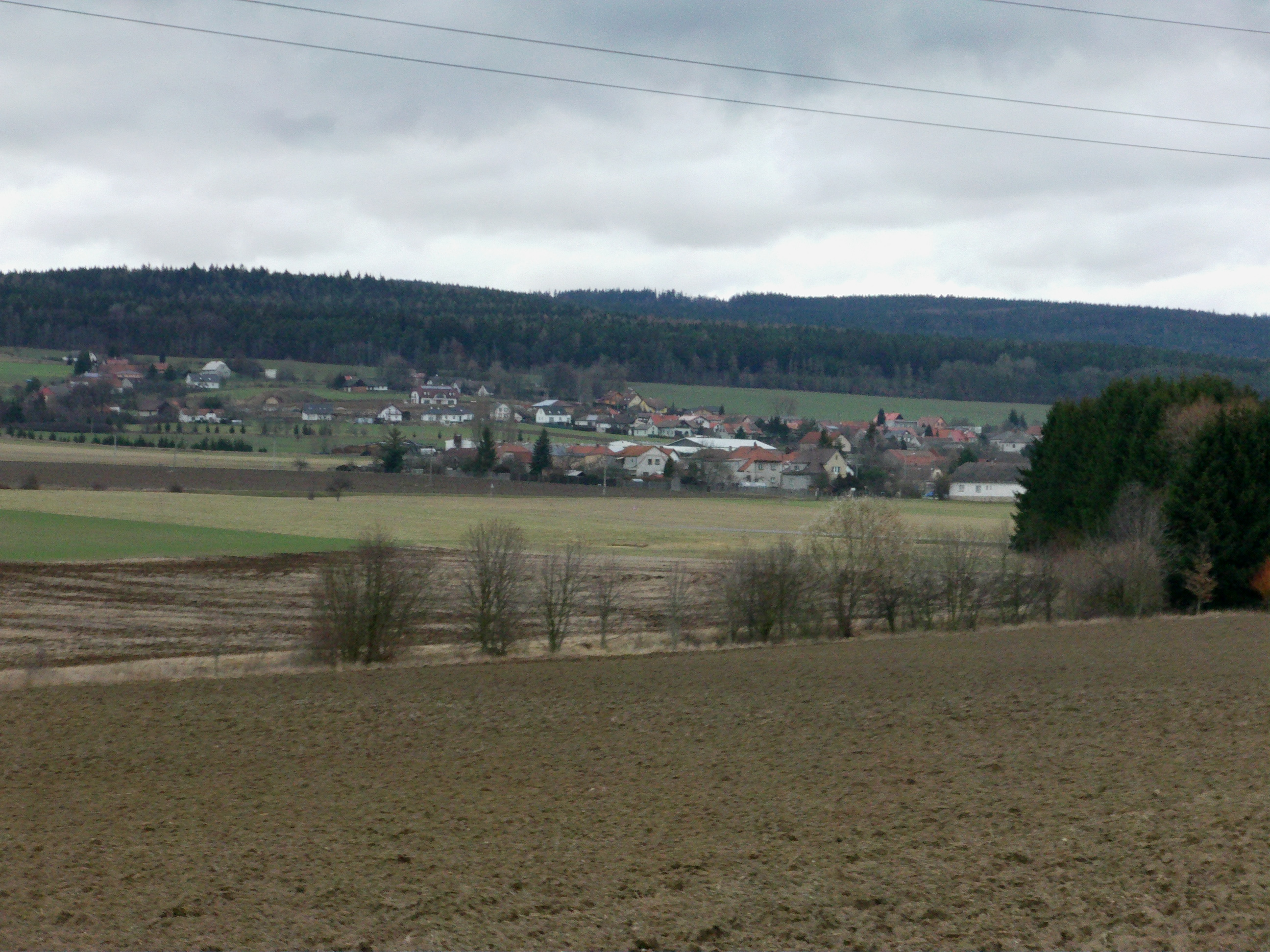 Volduchy, okres Rokycany od jihozápadu